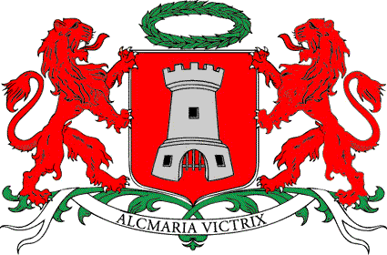 Wapen van Alkmaar